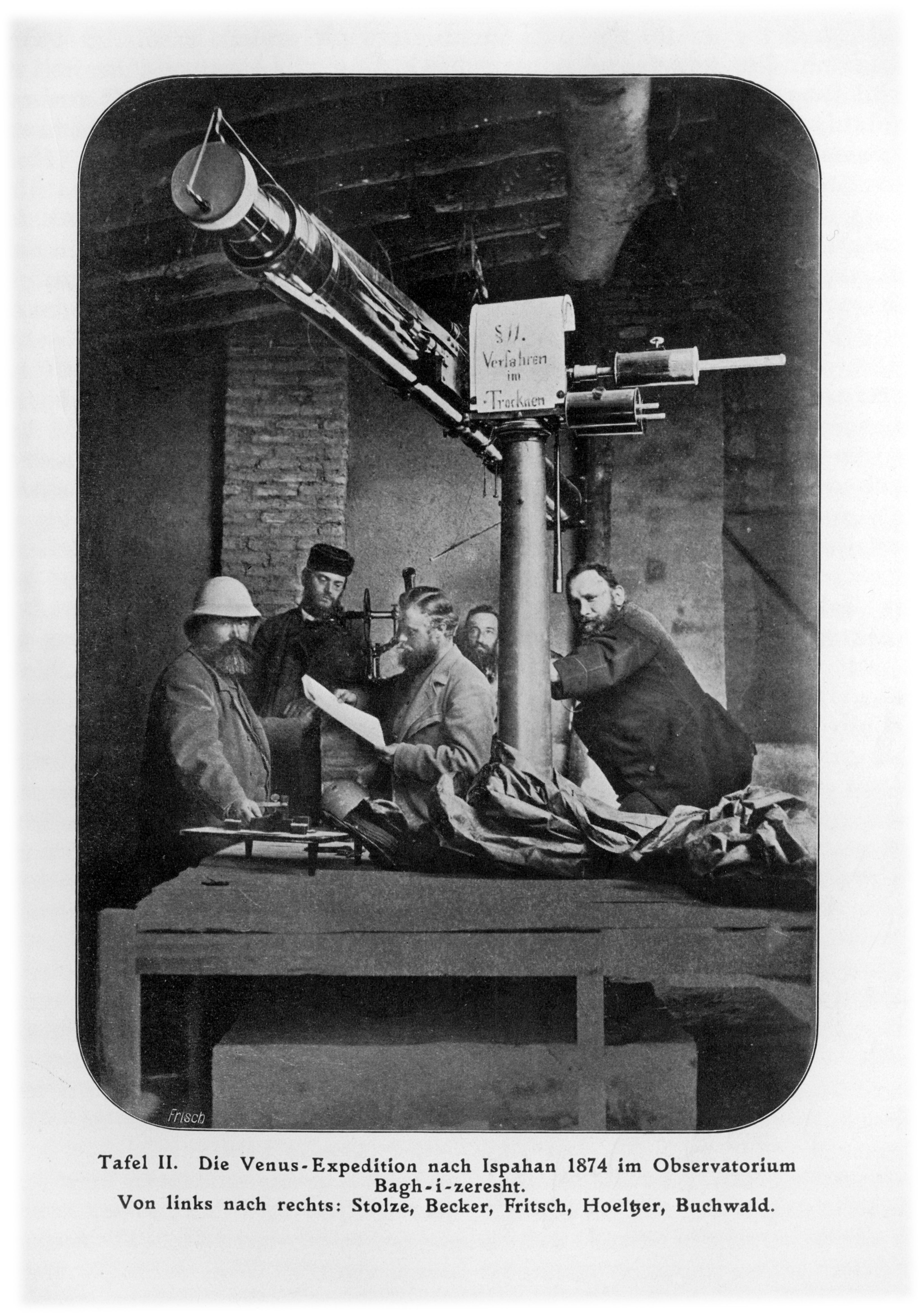 Denkschrift allässlich des zwanzigjährigen Bestehens der Freien Photographischen Vereinigung zu Berlin